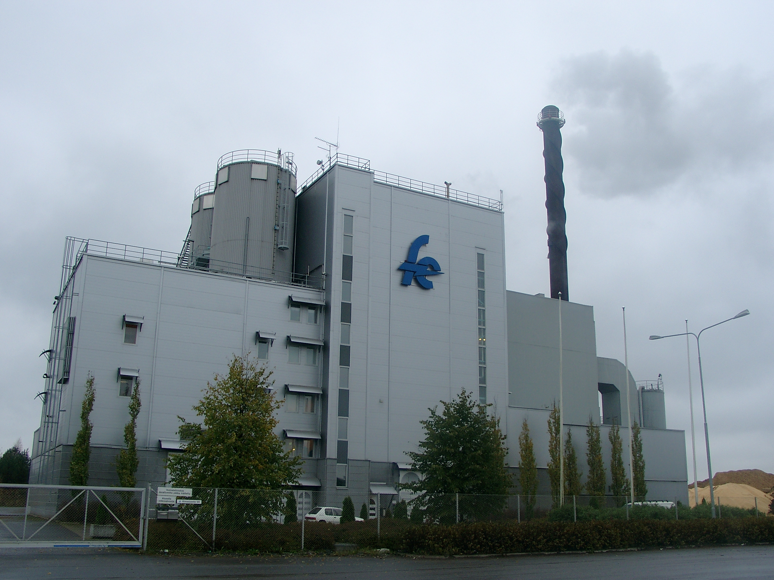 Vapon (aiemmin Forssan Energia Oy:n) vastapainevoimalaitos Forssan Kiimassuolla. Voimalaitos käyttää polttoaineenaan mm. turvetta ja puuhaketta sekä muuta kasvipohjaista polttoainetta. Huipputehoilla polttoaineeseen voidaan sekoittaa myös REF-uusiopolttoainetta. Laitoksen kattilassa on valmius maakaasupolttimen asennukseen, jos maakaasuverkosto saadaan riittävän lähelle syöttöputkea varten. Parhaimmillaan laitoksen hyötytehosta n. kolmannes on sähköä, ja kaksi kolmannesta käytetään kaukolämpöverkon lämpötehona. Kesäaikaan laitos käy puoliteholla. Kaukolämmön tarve on pieni, ja laitoksen pienet lauhduttimet eivät riitä poistamaan lämpöä täystehon aikaansaamiseksi.